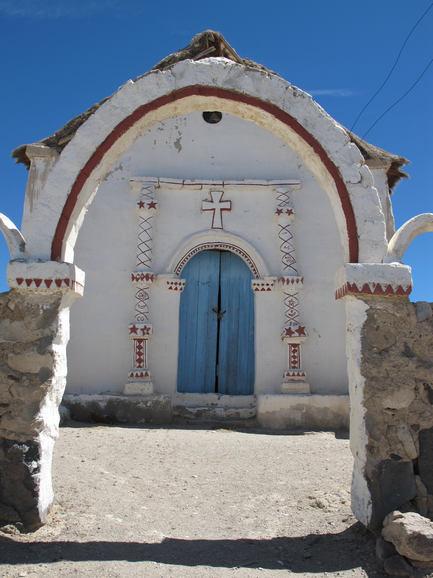 Detalle de la entrada a la Iglesia de Cotasaya. This is a photo of a national monument in Chile: 997